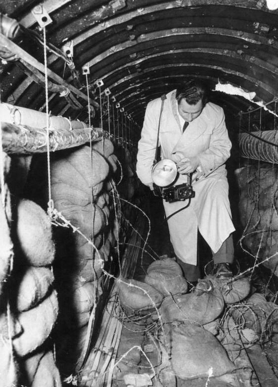 Zentralbild 24.4.1956 USA-Spionage Tunnel unter DDR-Gebiet Der amtierende Militärkommandant des sowjetischen Sektors von Berlin, Oberst Kozjuba, gab am Montagabend (23.4.56) auf einer Pressekonferenz vor zahlreichen in- und ausländischen Journalisten bekannt, dass am 22.4.1956 von sowjetischen Truppen eine amerikanische Abhörzentrale im demokratischen Sektor Berlins ausgehoben wurde. Amerikanische Stellen hatten im Gebiet von Altglienicke einen etwa 300 m langen Stollen angelegt, der zu den Fernmeldelinien der sowjetischen Truppen sowie zu den Fernmeldelinien der Deutschen Demokratischen Republik lief. Durch den Stollen ziehen sich Kabelleitungen, die vom amerikanischen Sektor ausgehen und an die Kabelleitungen der sowjetischen Truppen angeschlossen wurden. Im Anschluß an die Pressekonferenz fand eine Besichtigung der amerikanischen Abhörzentrale statt. UBz.: Der "Stern"-Bildreporter überschreitet die Stacheldrahtsperre, dies sich kurz vor der von den Amerikanern errichteten Barriere befindet..